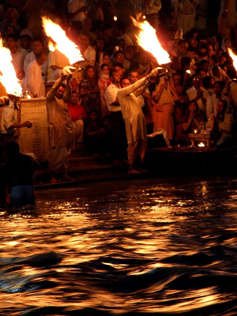 Evening Aarti at Har-ki-Pauri